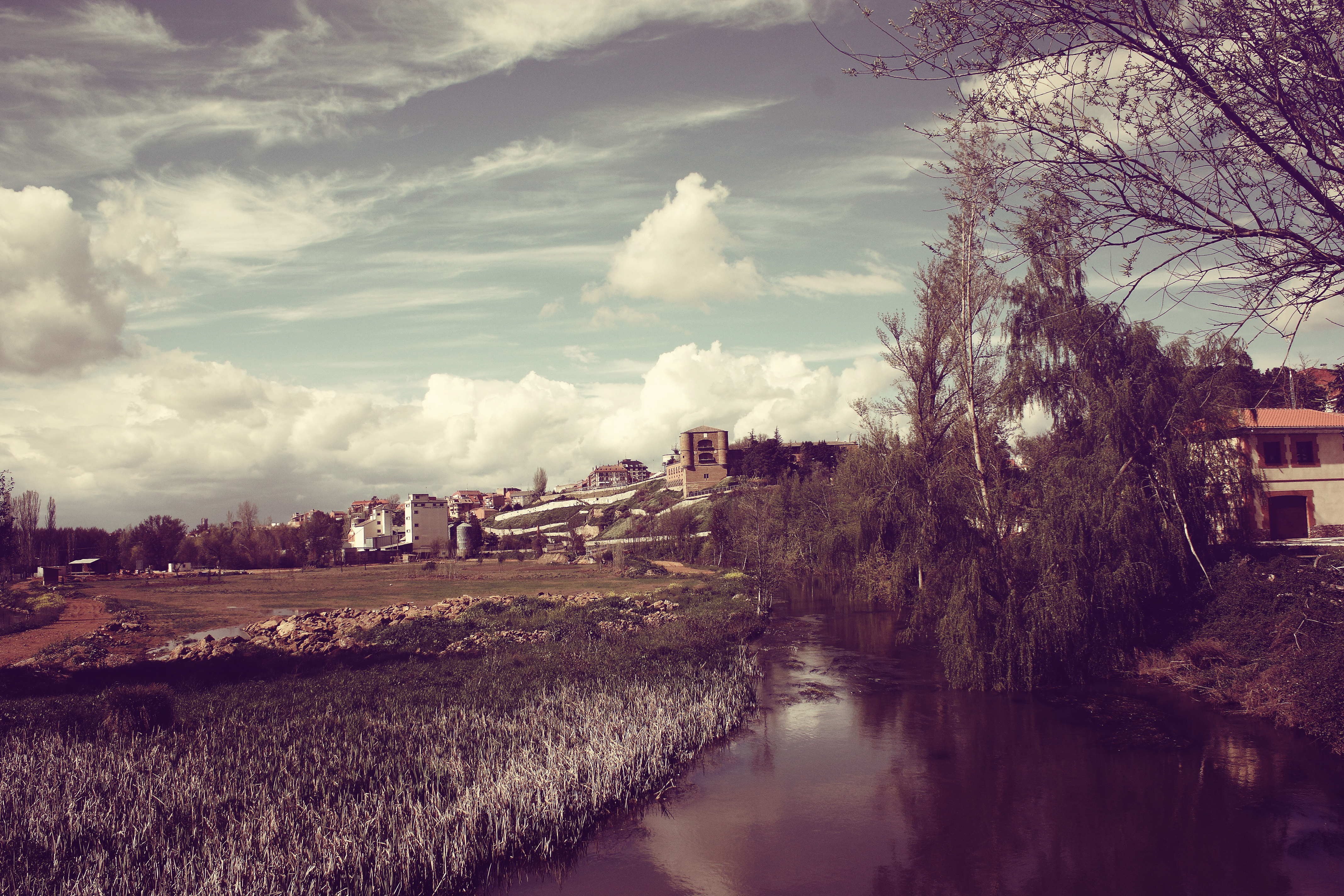 Muy probablemente sea un de mis envios para la V exposición fotográfica de Zamora y provincia - 2010